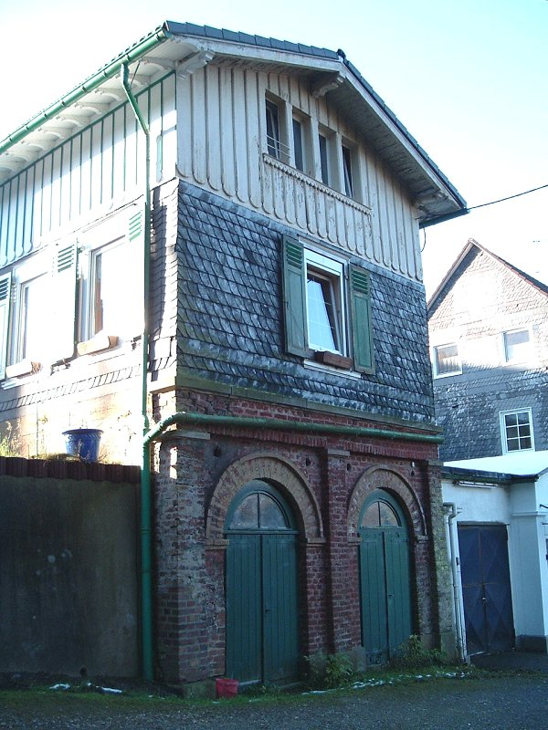 Die ehemalige Brauerei von Krebsöge Fotographiert von Benutzer:Taube Nuss im November 2004 "Lizenz: GNU FDL"